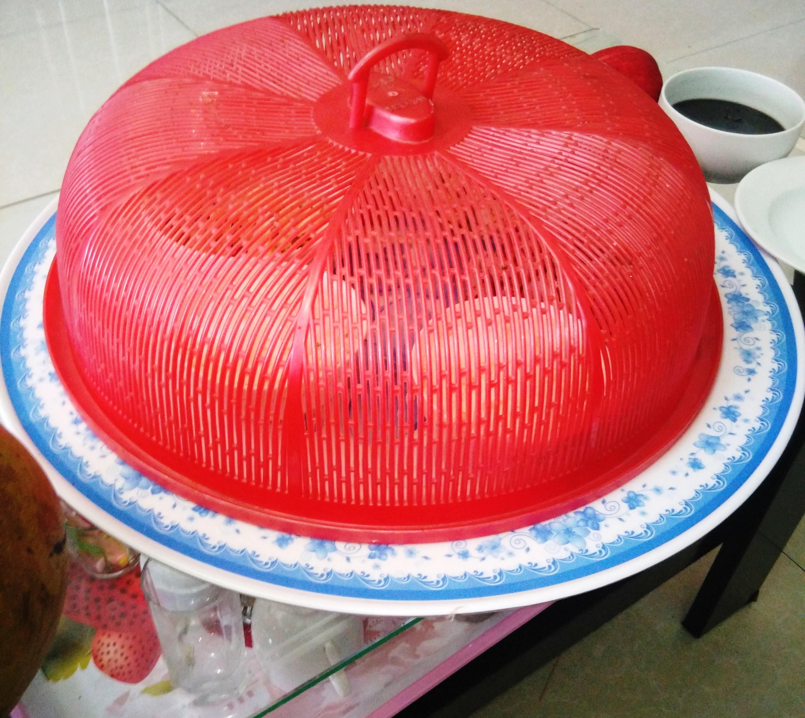 Lồng bàn (cặp lồng) đậy mâm cơm, tháng 5 năm 2018